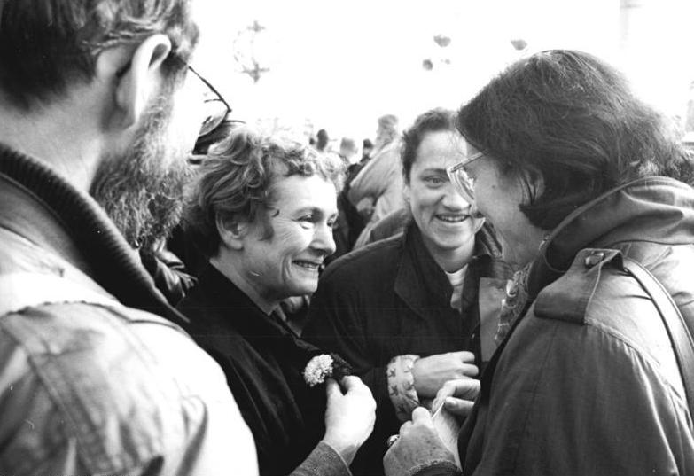 ADN-ZB Link-4.11.1989 Berlin: Demonstration 500.000 Bürger beteiligten sich an einer Demonstration für den Inhalt der Artikel 27 und 28, der Verfassung der DDR. Auf dem anschließenden Meeting auf dem Alexanderplatz, nahmen auch Bärbel Bohley (m.) und Christa Wolf (r.) teil.